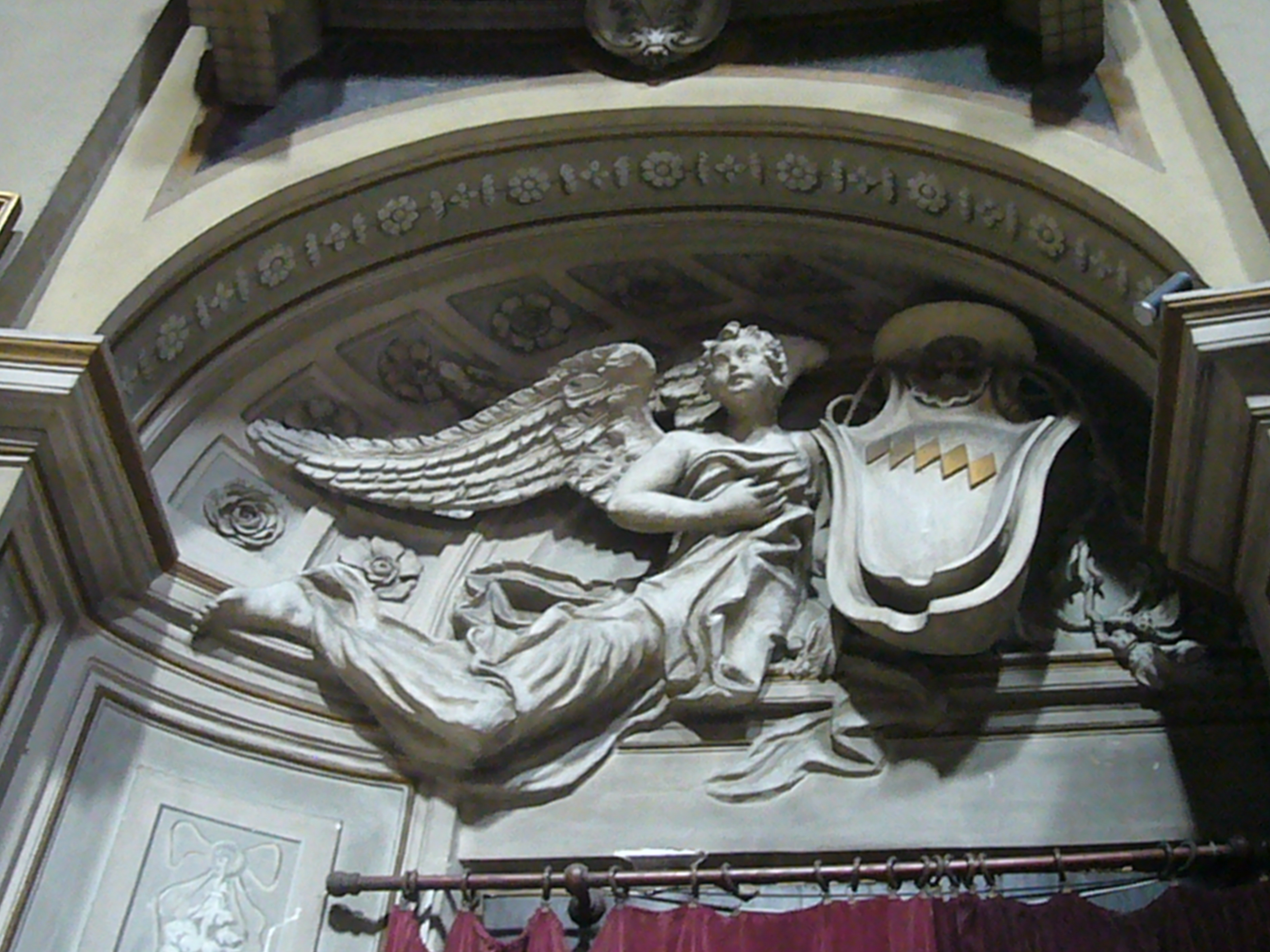 Roma, S. Maria dei Miracoli a piazza del Popolo. Stemma del cardinal Gastaldi in controfacciata.